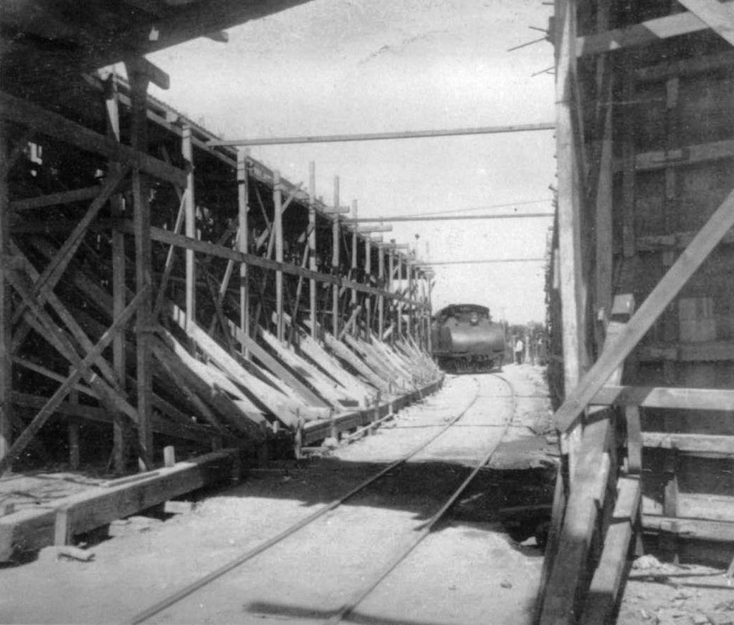 Puente Alsina en Construcción. Por debajo la Sentinel se asoma.